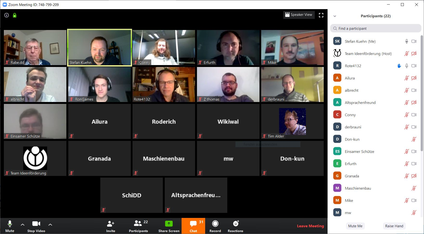 Der 162. Wikipedia-Stammtisch Dresden wurde als Videokonferenz durchgeführt. Ein gemeinsames Treffen in einem Lokal war wegen dem Coronavirus nicht möglich. Aber es haben sich auch aus anderen Regionen und Österreich Wikipedianer dazuschalten können.